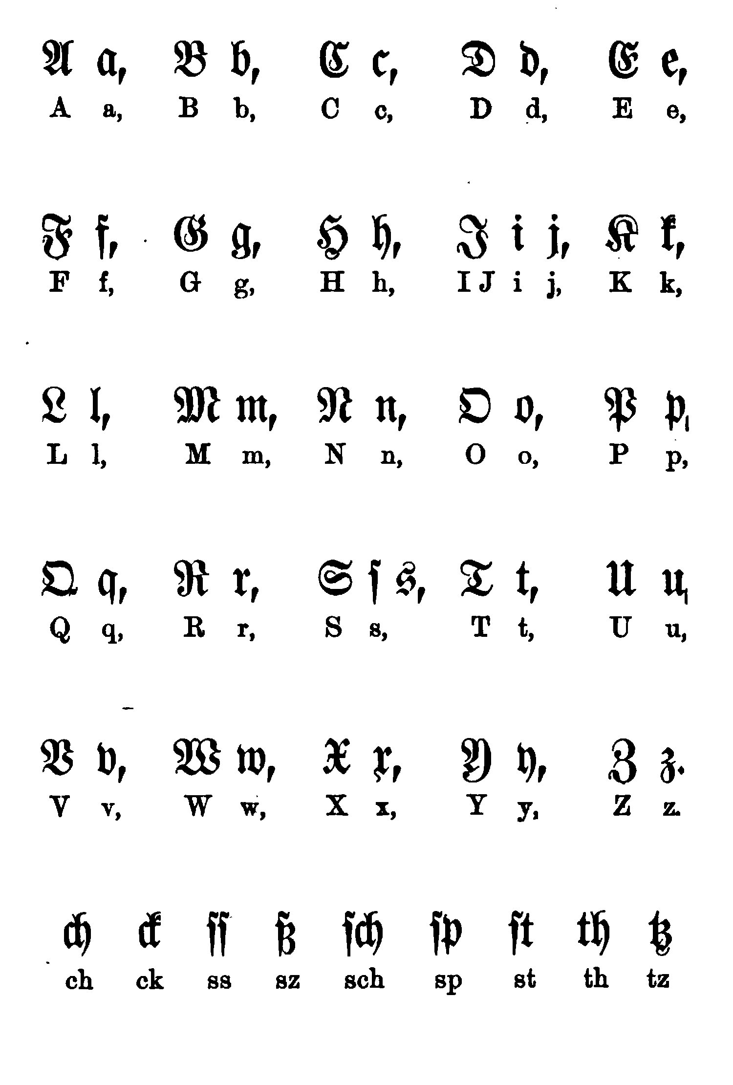 Fraktur-Alphabet. Aus: Deutsches Lesebuch. S. 12